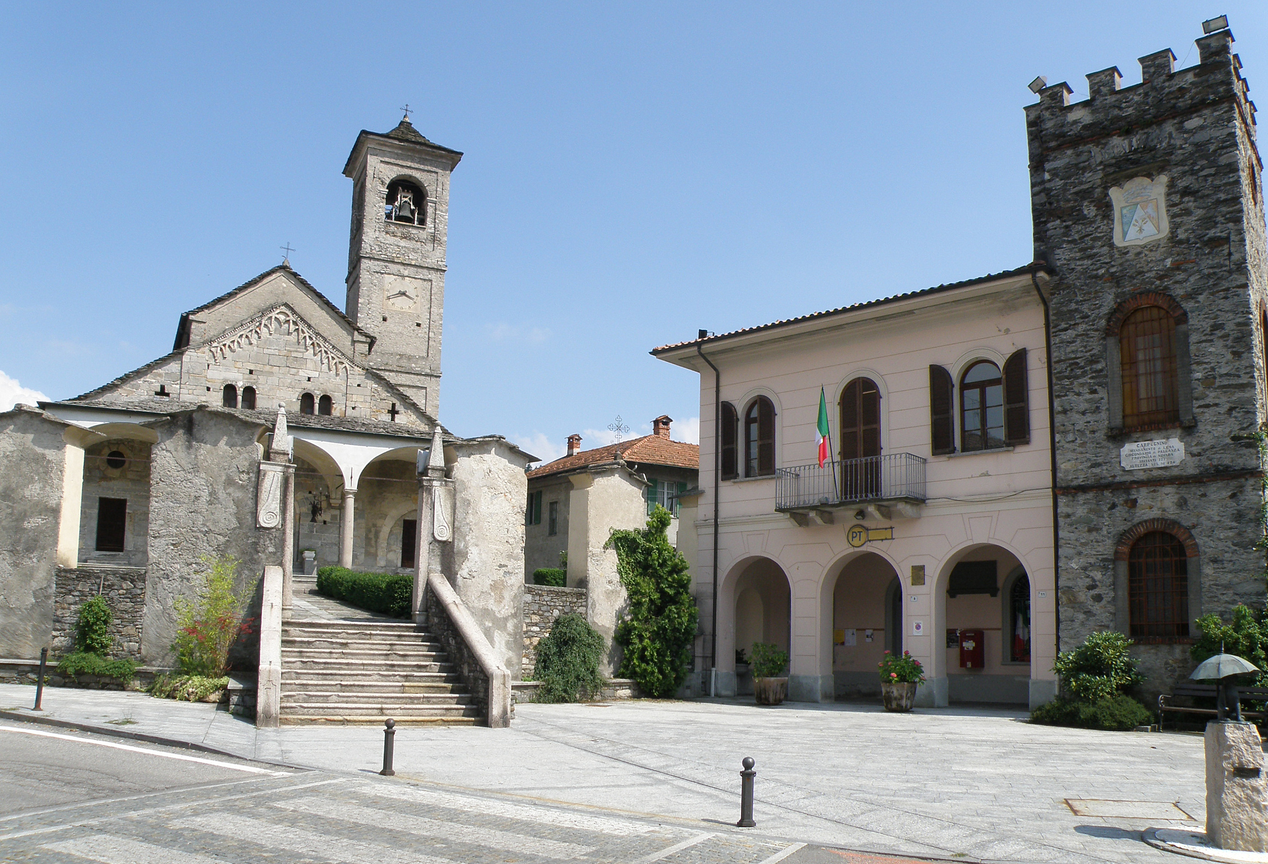 Carpugnino, fraz. del comune di Brovello-Carpugnino (VB). Piazza I Gennaio.